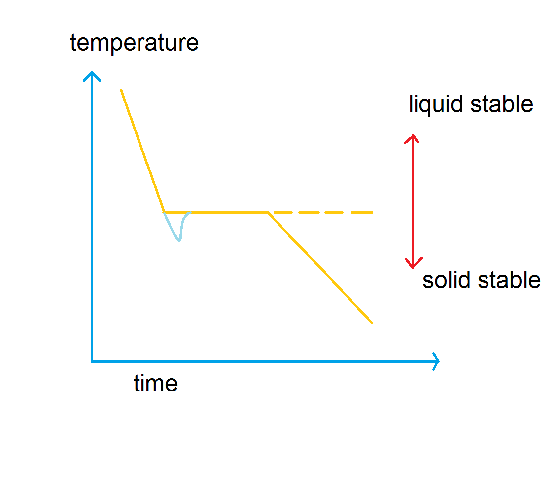 مادون تبرید